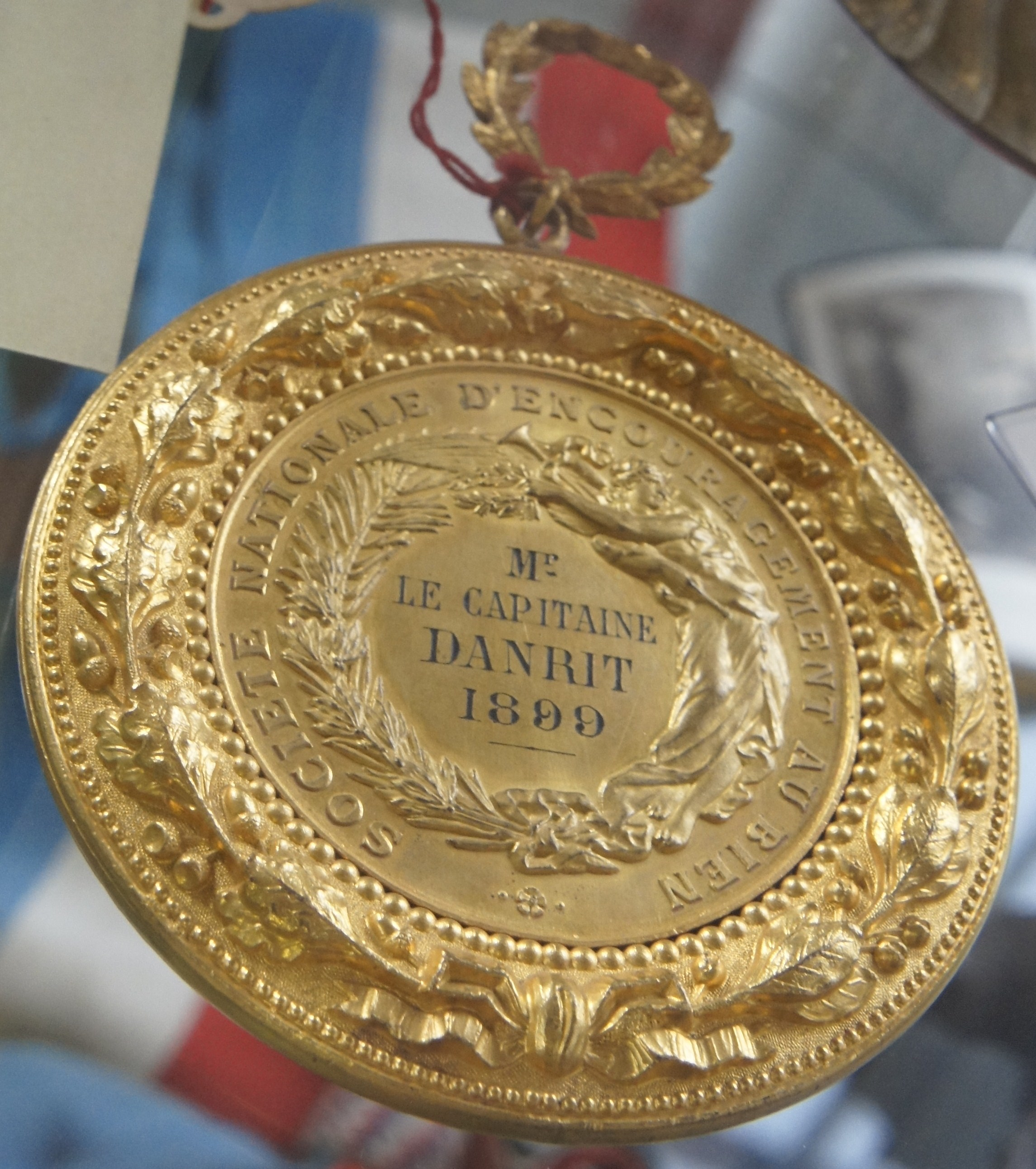 Danrit reçoit la Médaille_d'encouragement_au_bien en 1899.